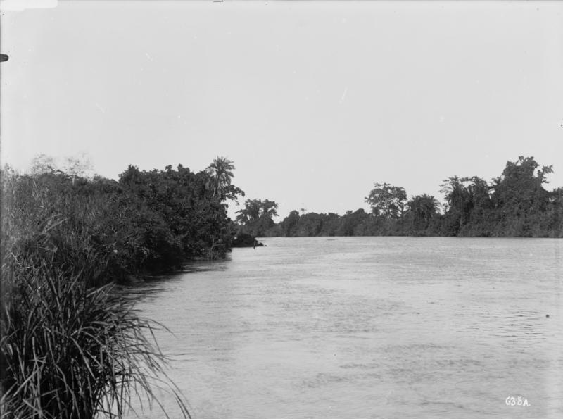 Bagamojo, Partie am Kinganifluß